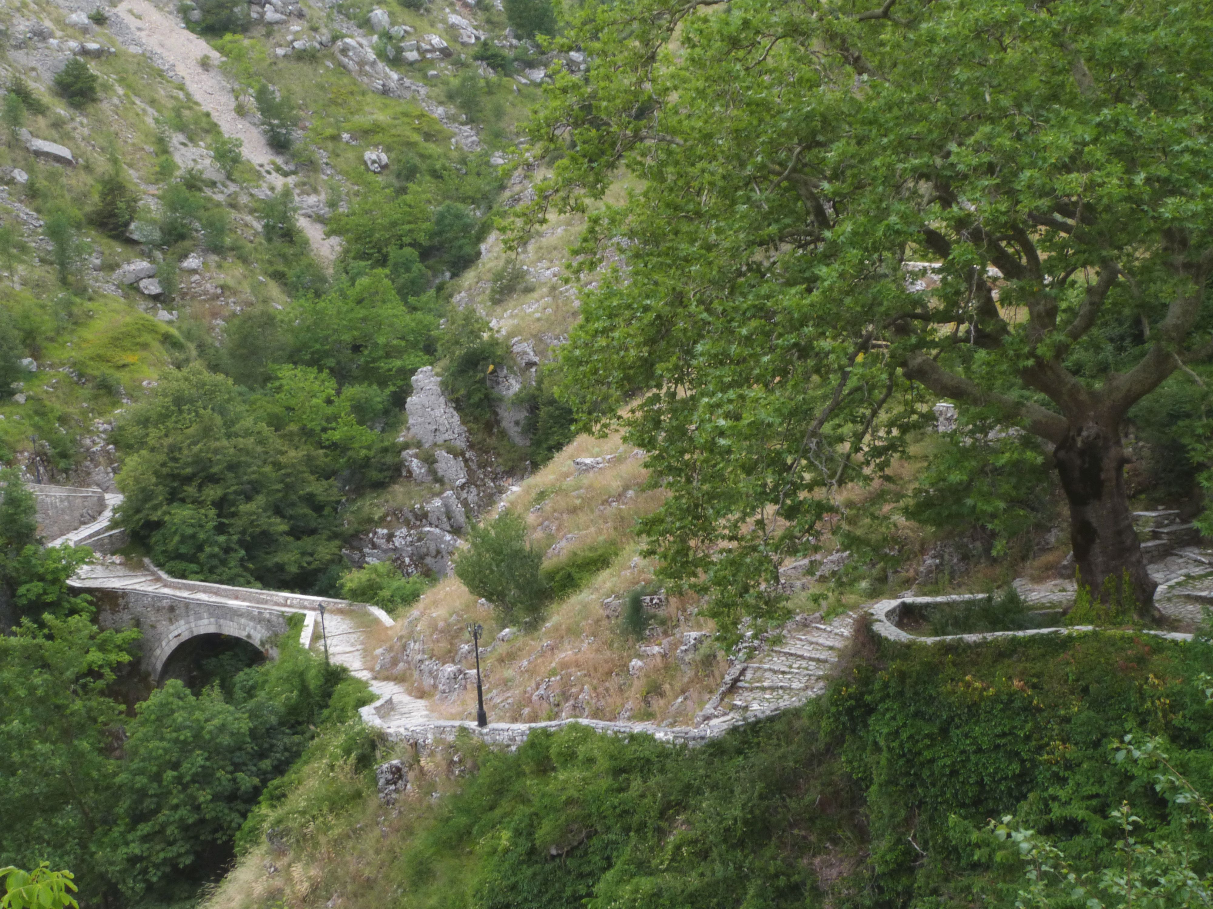 Zugang zum Dorf Siriko/Tzoumerka